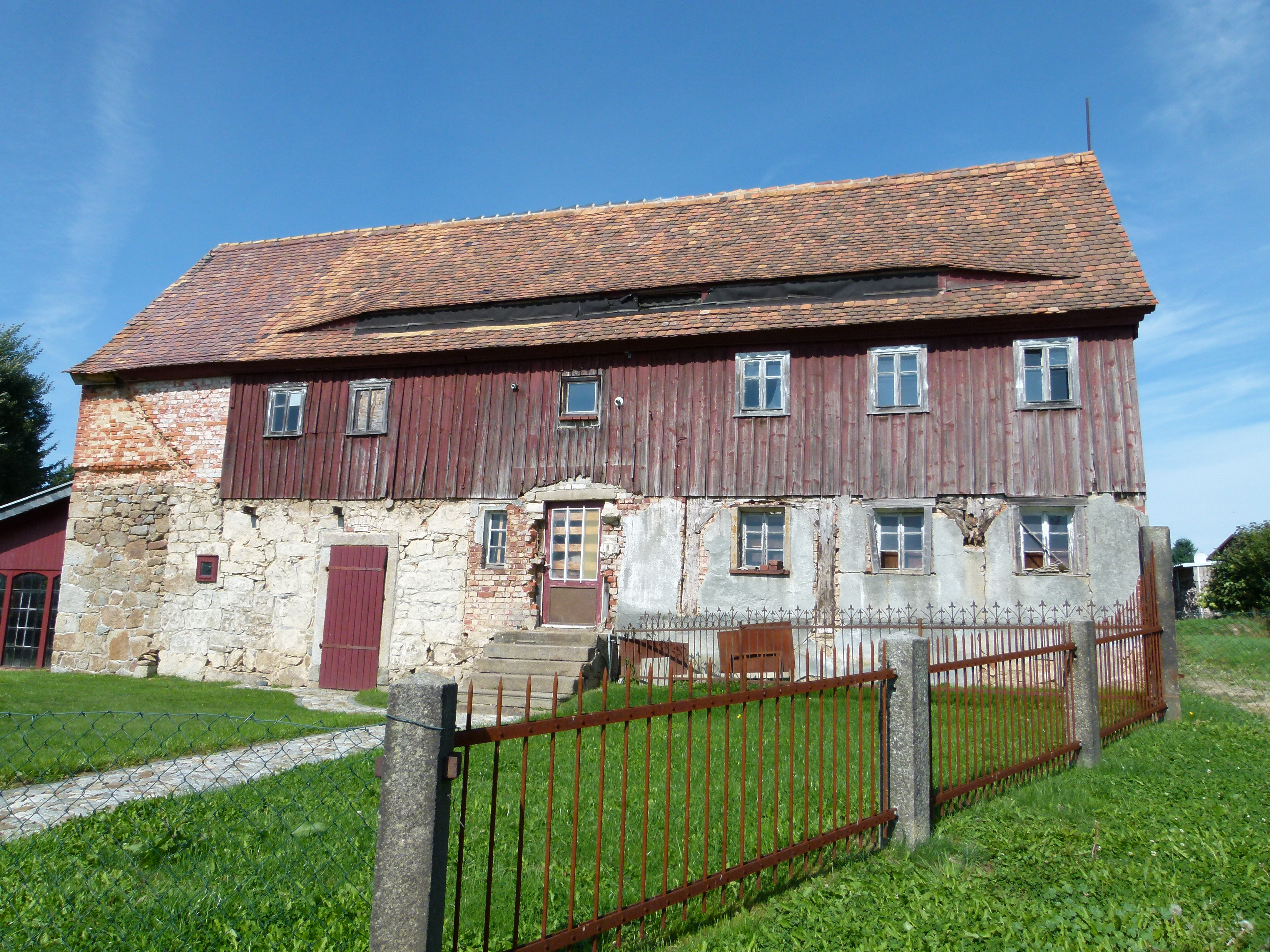 Denkmalgeschütztes Umgebindehaus, Alte Straße 12 Großdehsa, Löbau Hornjoserbsce: Přetwarjena chěža ze stołom w Dažinje